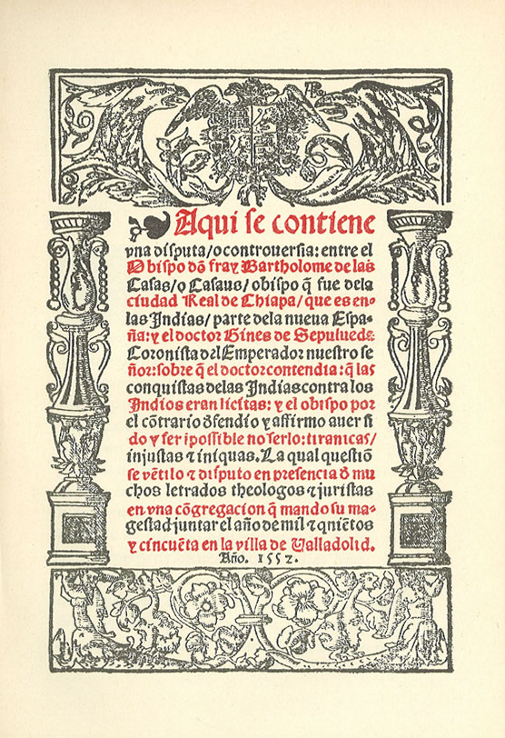 Portada del Disputa o controversia con Ginés de Sepúlveda. Publicado en Sevilla en 1552 por Bartolomé de las Casas.